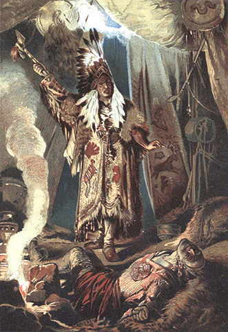 Illustration von Hermann Vogel in Die Gefahren der Wildnis (Originaltitel: Nick of the woods, or The Jibbenainosay). Eine Erzählung für die reifere Jugend. Nach dem Englischen des Dr. Bird bearbeitet von Franz Hoffmann. Neunte Auflage. Mit sechs Farbendruckbildern nach Aquarellen von Hermann Vogel. Stuttgart, K. Thienemanns Verlag. (1889). Die erste Auflage mit Bildern von Hermann Vogel ist 1883 erschienen.